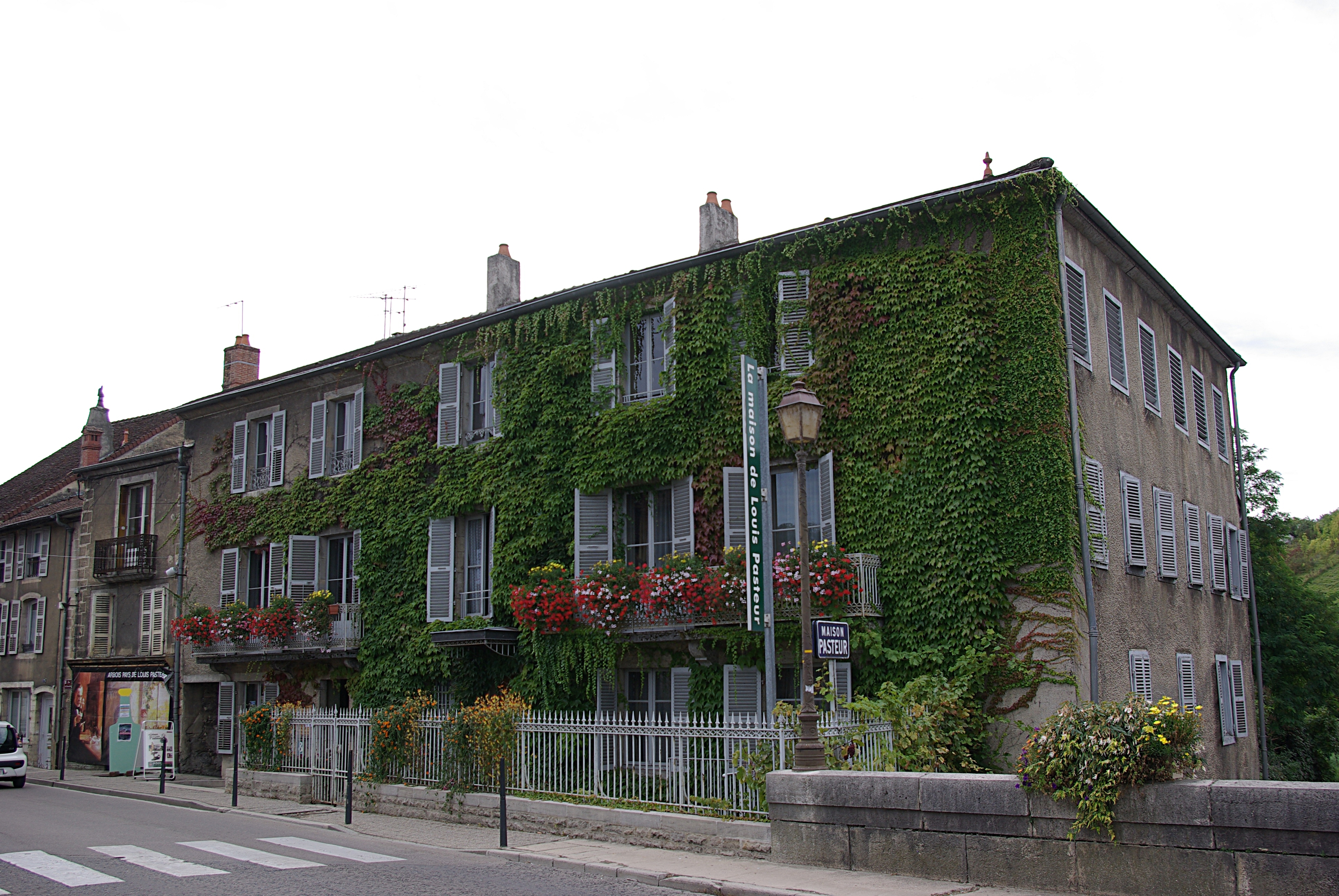 Arbois in Frankreich. In dem Haus befindet sich Museum Pasteurs. Hier hat er seine Kindheitstage verbracht.